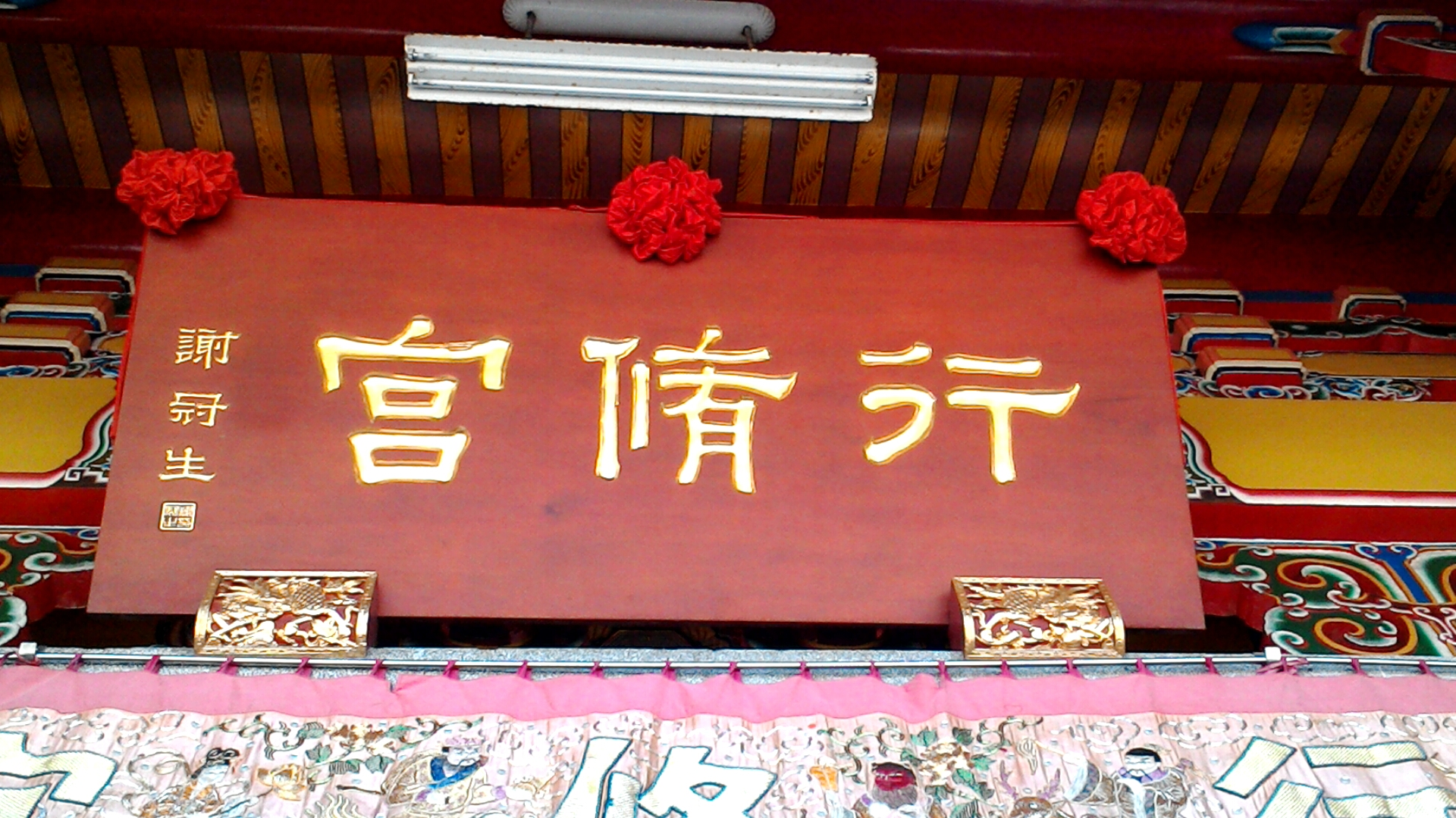 三峽行修宮中謝冠生所題的匾額,新北市三峽區嘉添里